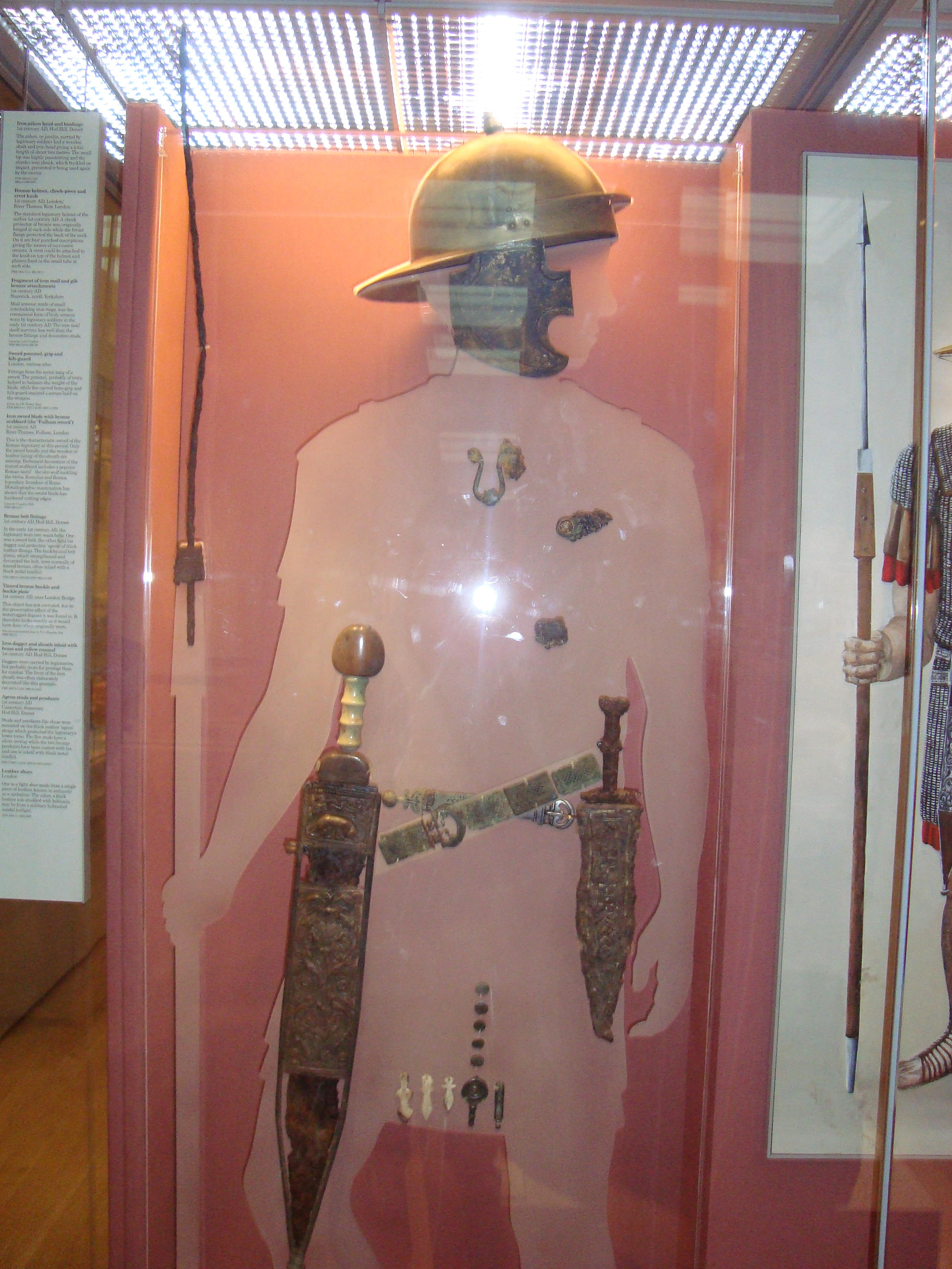 Armas de un legionario romano expuestas en el British Museum de Londres